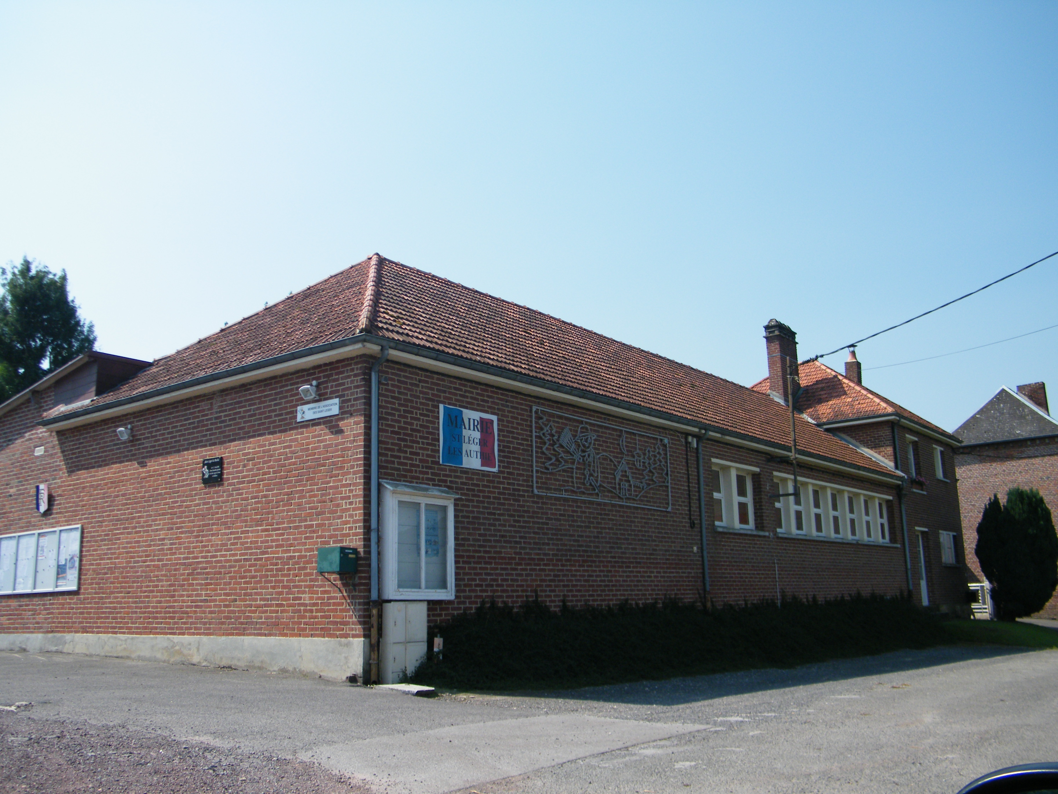 Mairie-école.